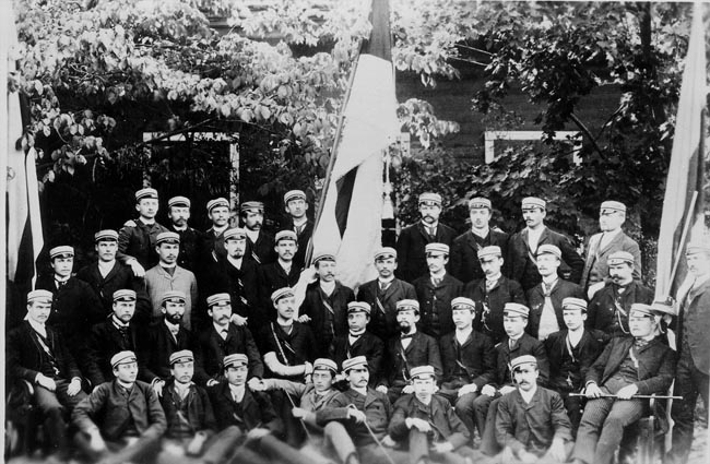 Fraternitas Viliensis